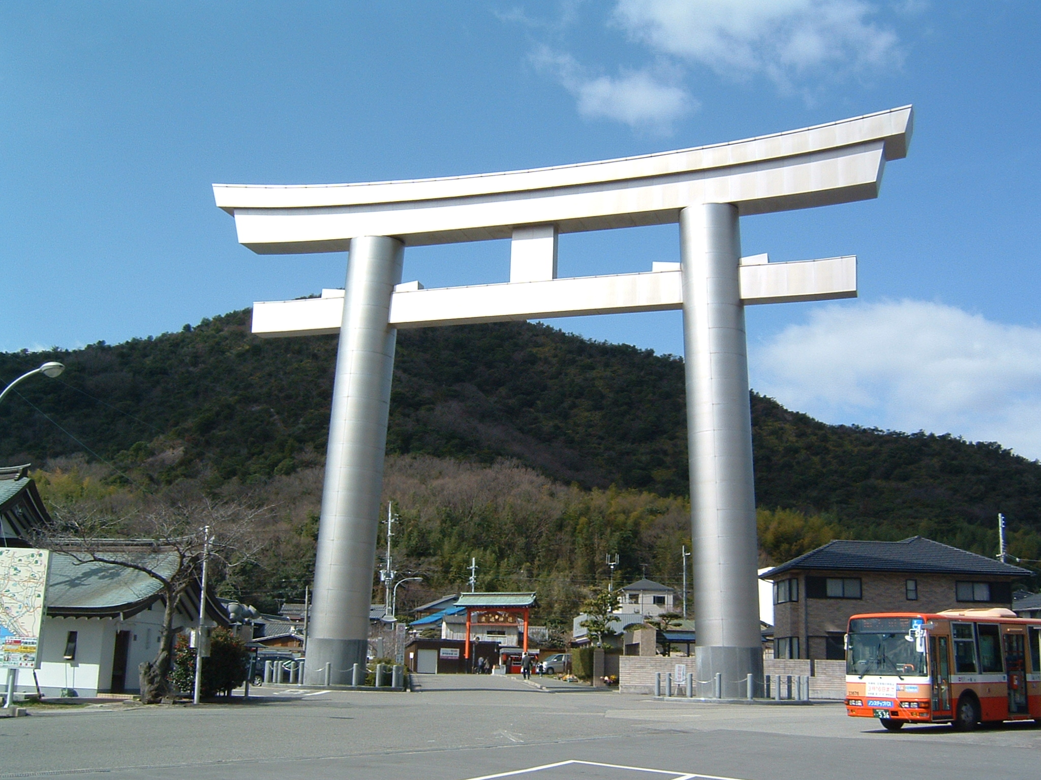 Kashima jinja（鹿嶋神社 (高砂市)）